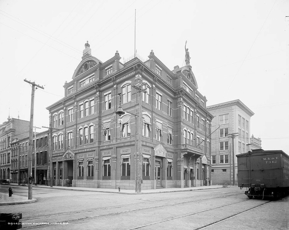 Cotton exchange, Mobile, Ala.